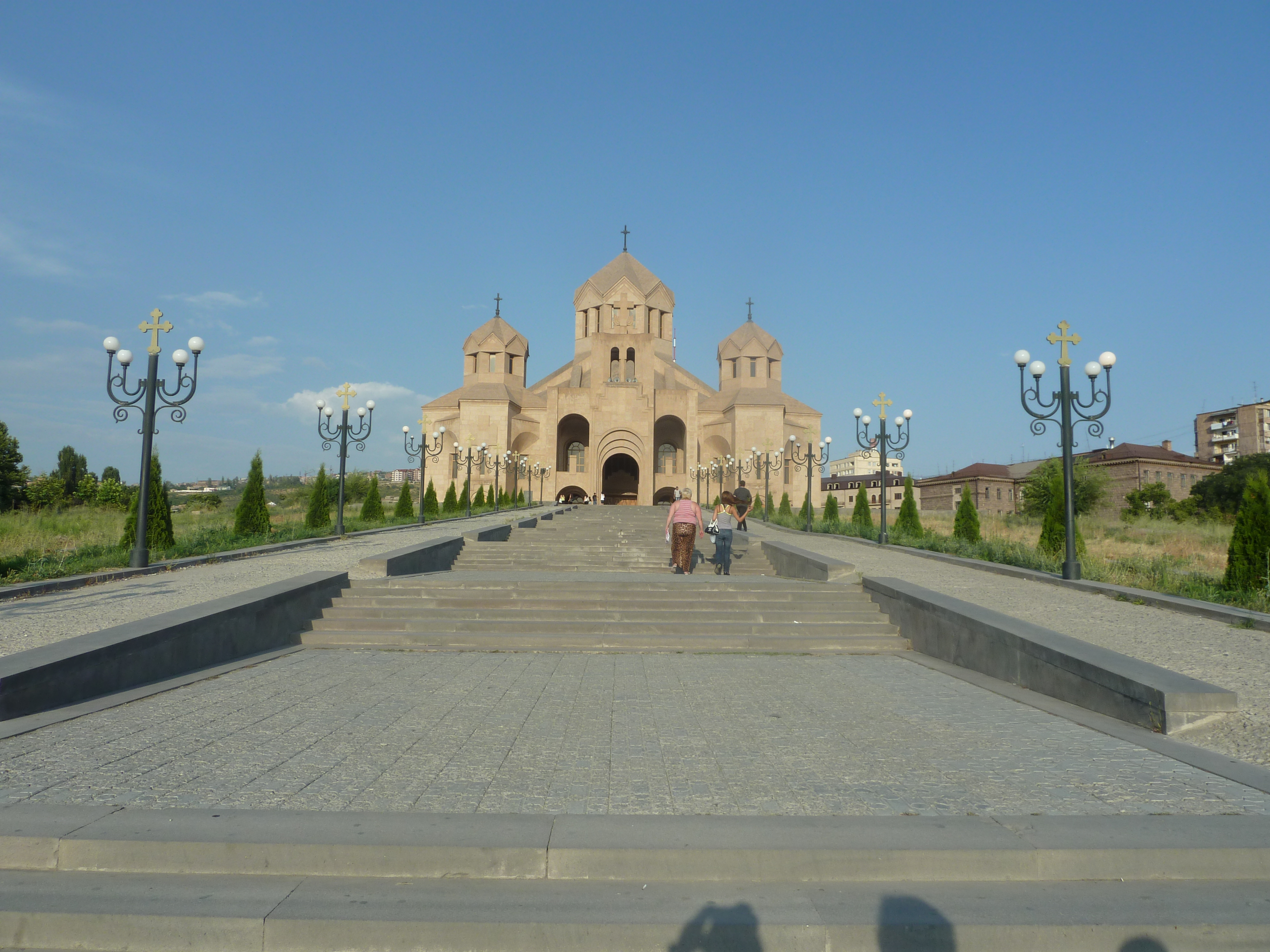 Երևանի Սուրբ Գրիգոր Լուսավորիչ մայր տաճարը: 60/10